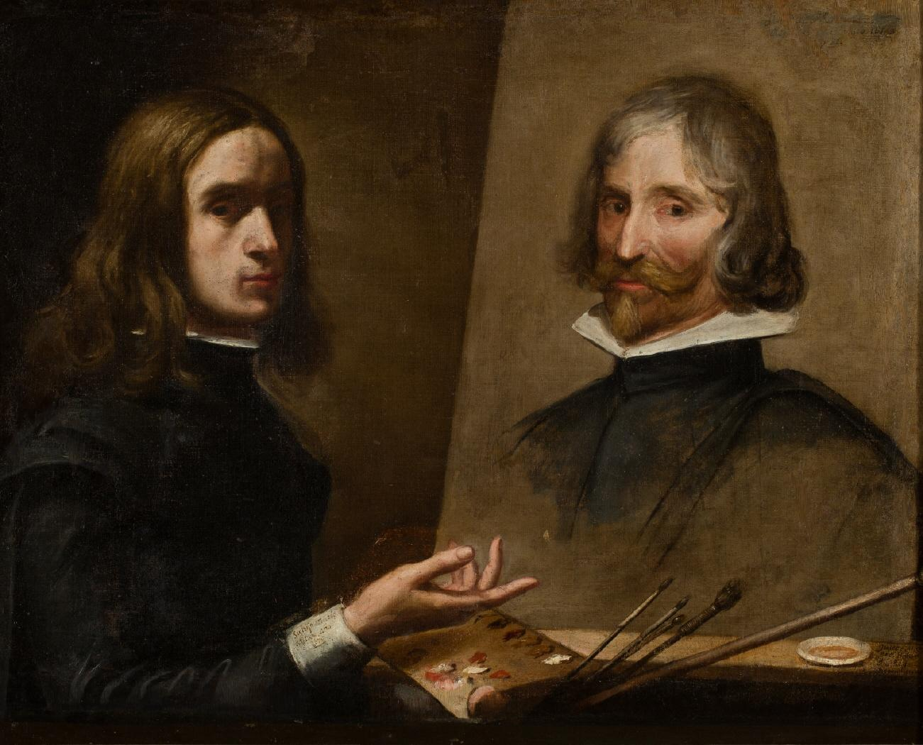 La obra representa al pintor Jusepe Martínez (1600-1682) retratando a su padre, Daniel Martínez (1555-1636).